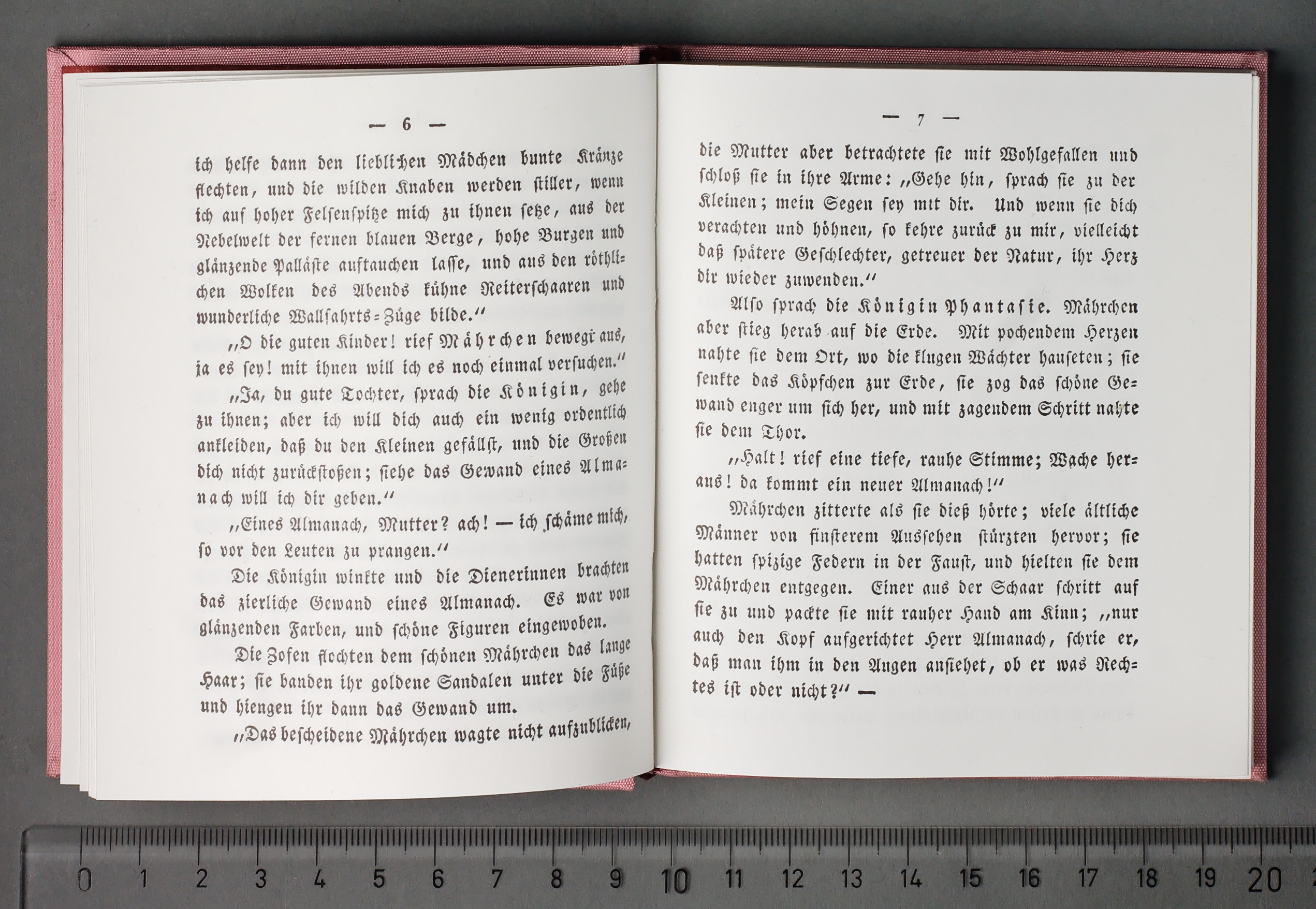 Wilhelm Hauffs Märchen-Almanach auf das Jahr 1826 in einer Faksimileausgabe von 1991 (J. B. Metzlersche Verlagsbuchhandlung). Zu sehen sind Seite 6 und 7 der einleitenden Erzählung Mährchen als Almanach.